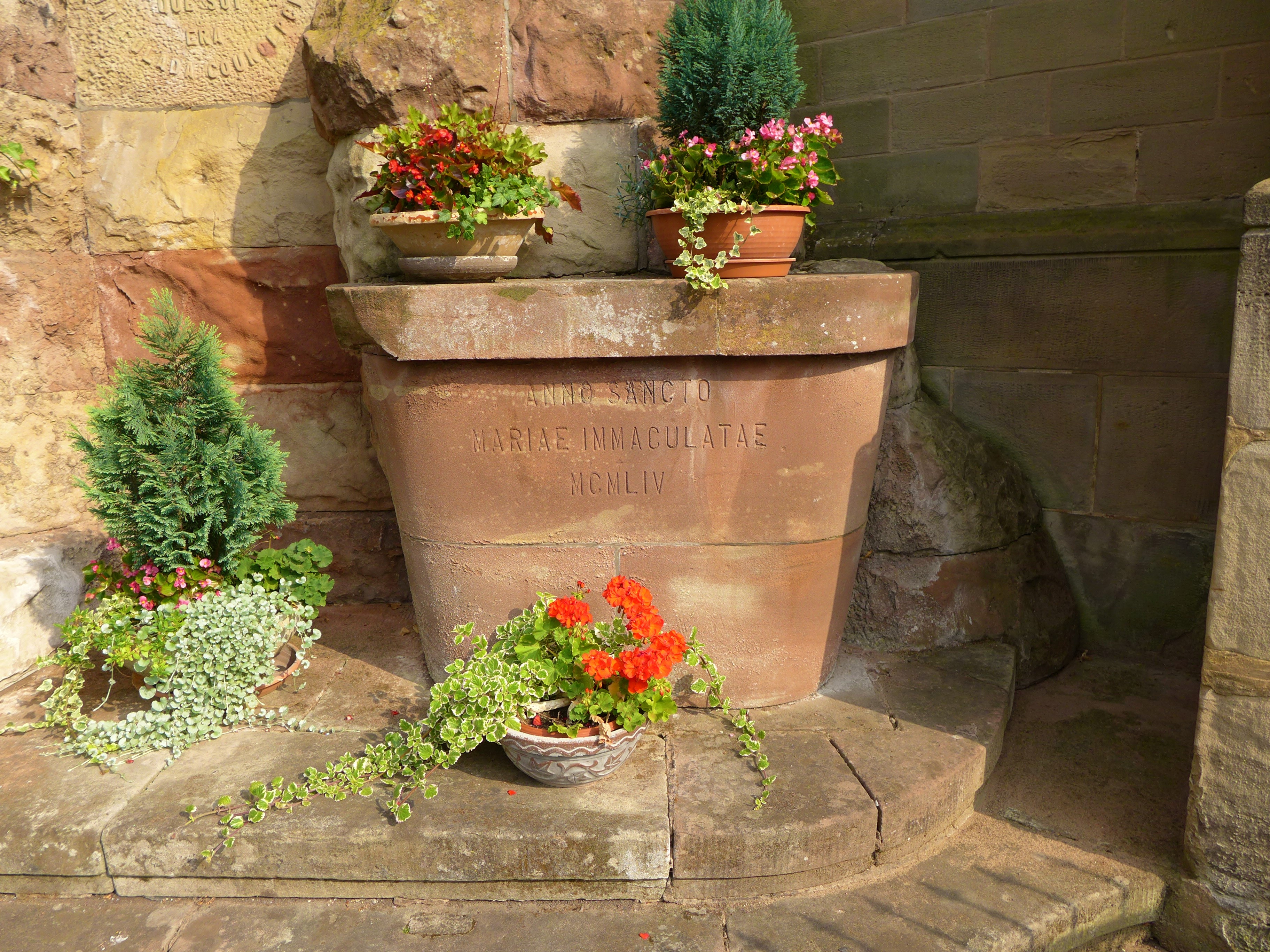 St. Katharina (Wallerfangen), Detail Lourdesgrotte